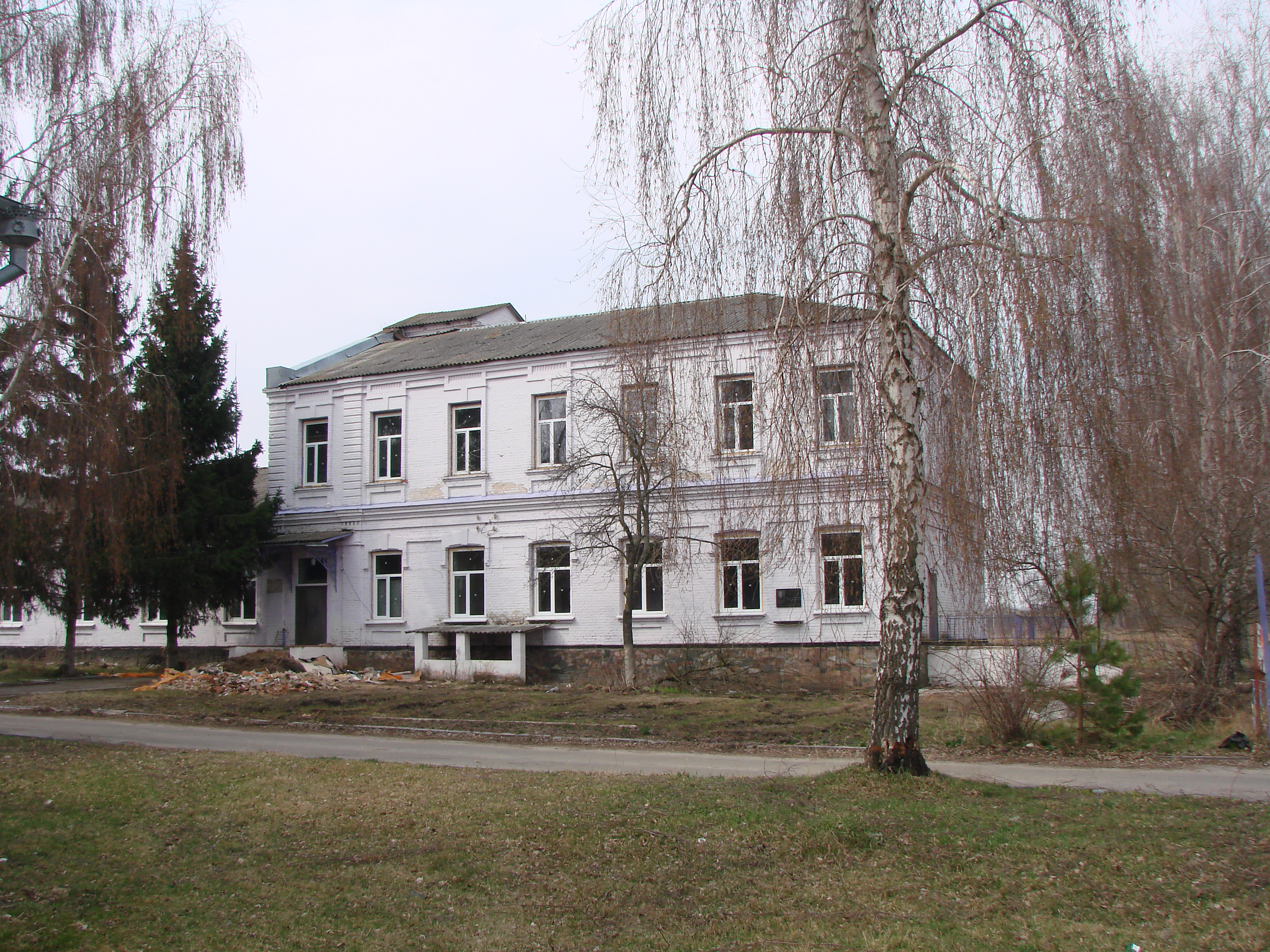 Корпуси старої земської лікарні-основний корпус з фасаду